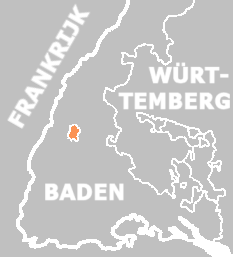 NL: Vorstendom Geroldseck/Hohengeroldseck (Vorstendom van der Leyen) in 1812 DE: Fürstentum Geroldseck/Hohengeroldseck (Fürstentum von der Leyen) 1812 EN: Principality of Geroldseck/Hohengeroldseck (Principality "von der Leyen") in 1812